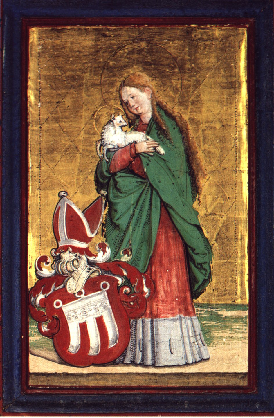 Sigmaringer Hausaltärchen rechts oben, Hl. Agnes mit dem Wappen der Gräfin von Werdenberg Eingescannt aus: Anna Moraht-Fromm und Hans Westhoff: Der Meister von Meßkirch – Forschungen zur südwestdeutschen Malerei des 16. Jahrhunderts, Ulm, 1997, S. 58